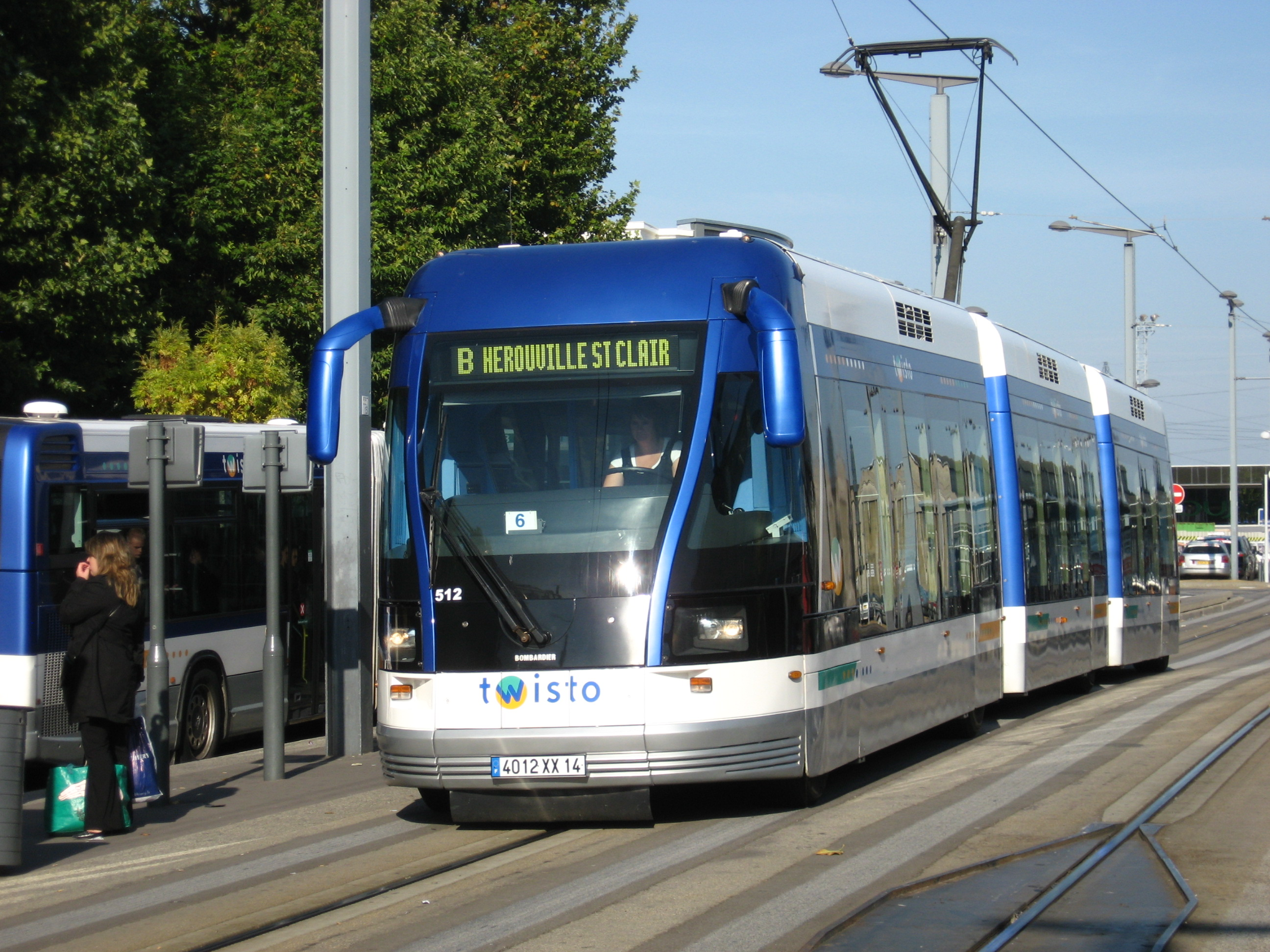 Rubberbandtram in Caen